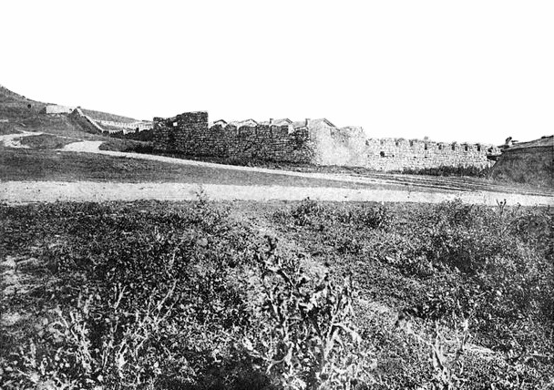 Крепость (Укрепление) Шатой. Воздвигнуто в 1858 году на оккупированных землях тайпа Хаккой.